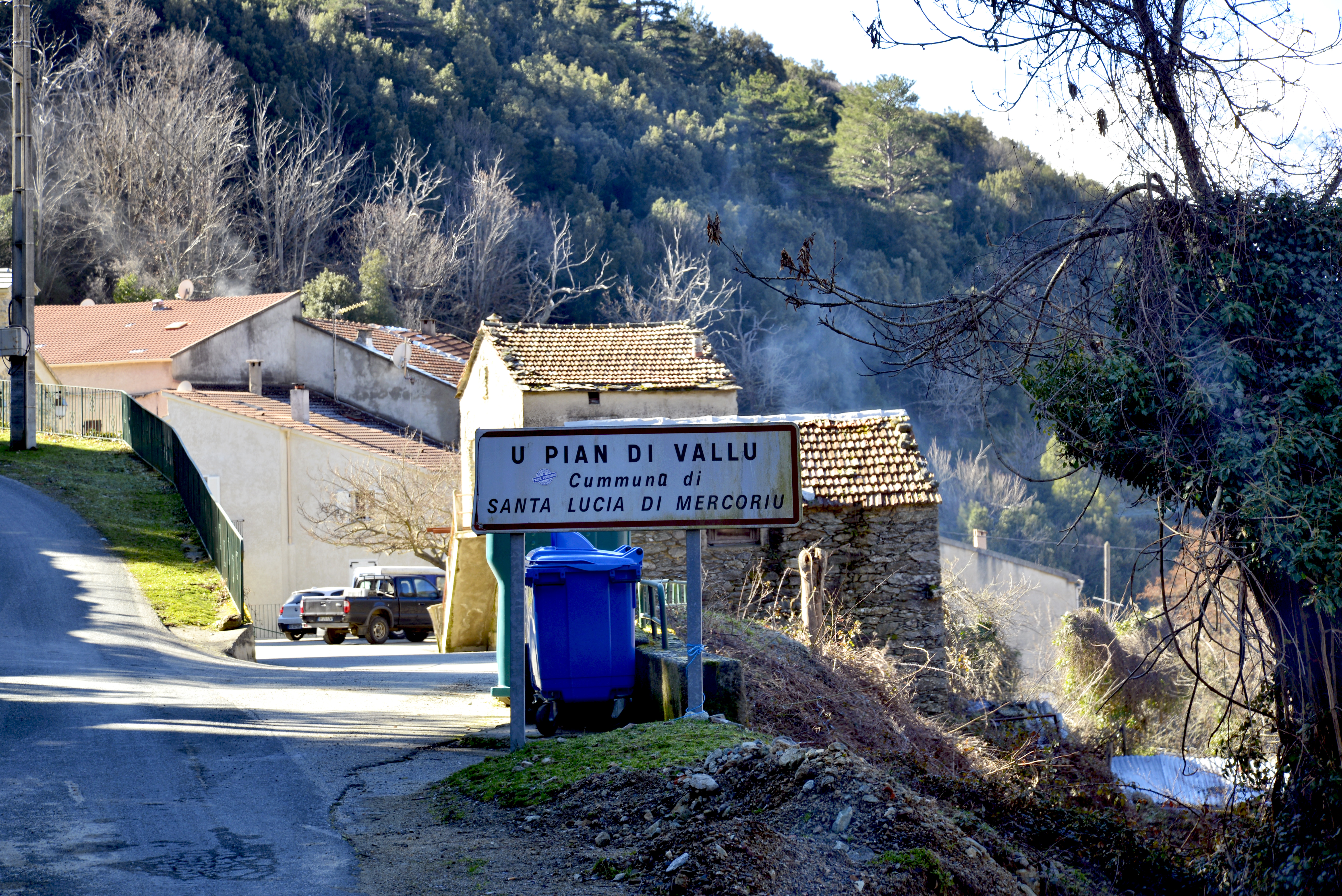 Santa-Lucia-di-Mercurio, Bozio (Haute-Corse) - Hameau de Piedivaldo situé en-dessous du village.